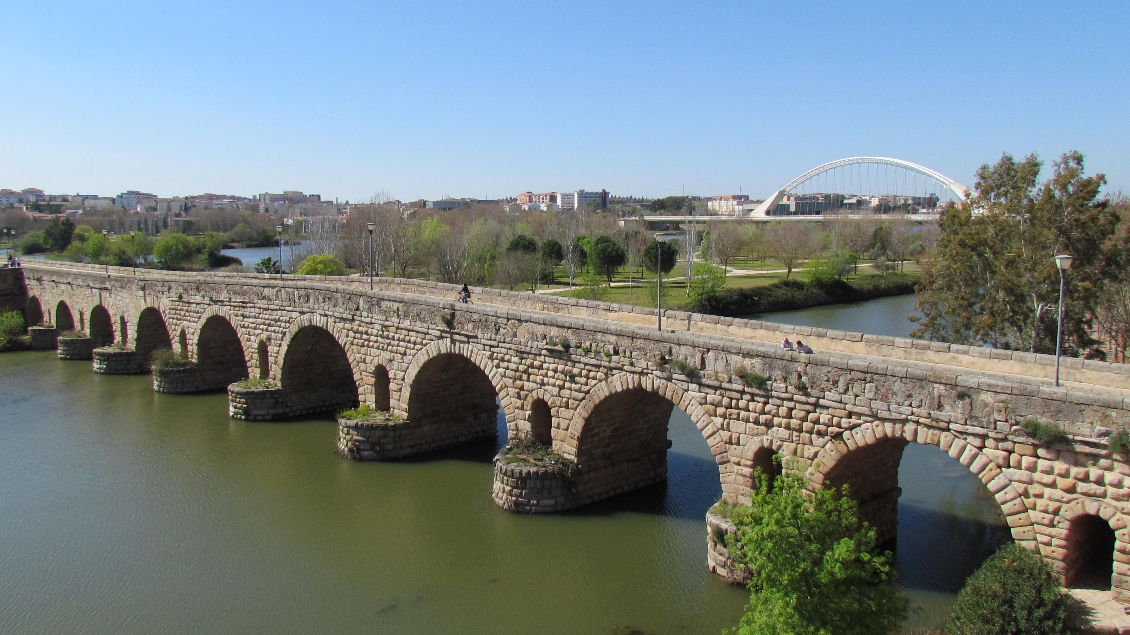 Rimski most v Méridi, Španija.